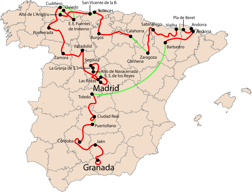 Vuelta a Espana 2008